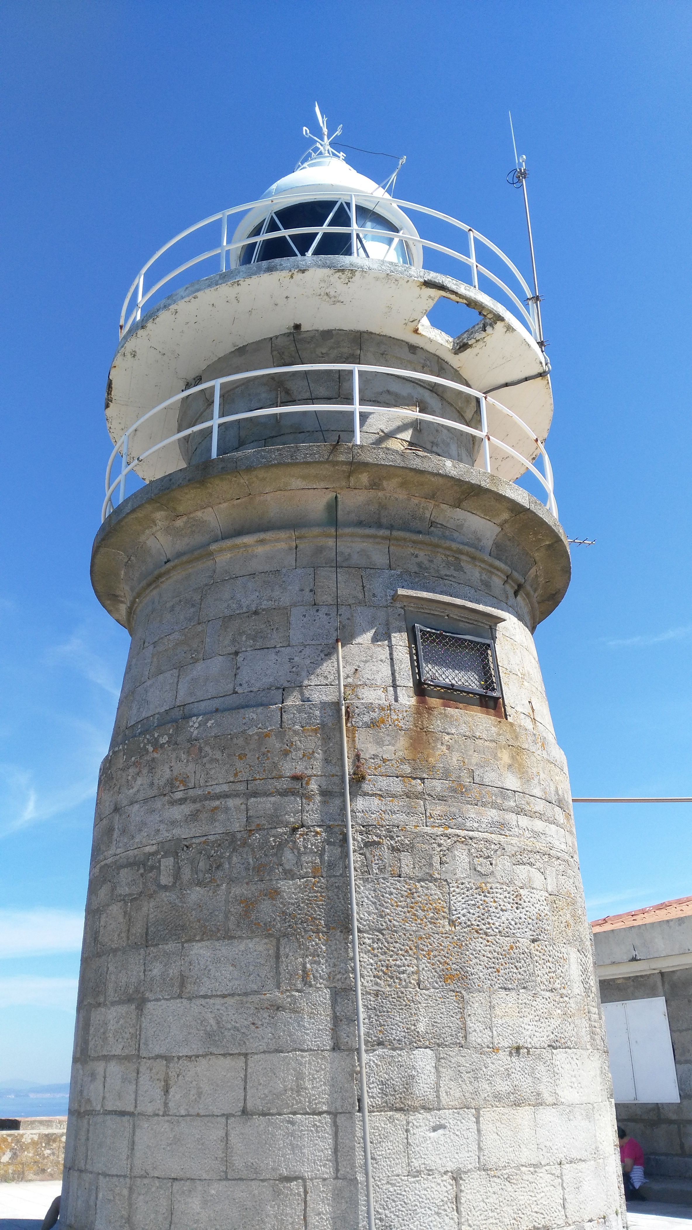 Faro das Cíes